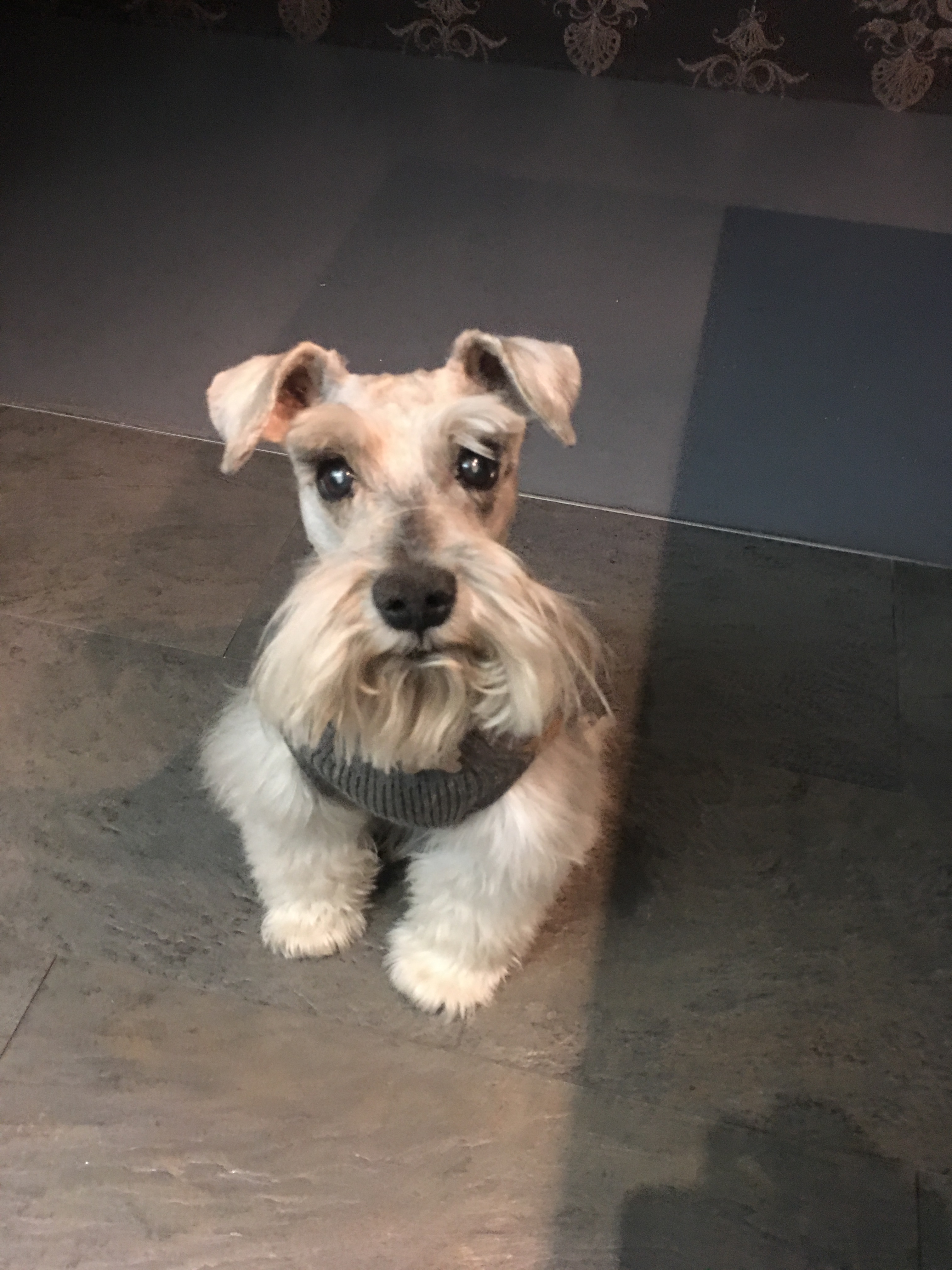 Schnauzer standard